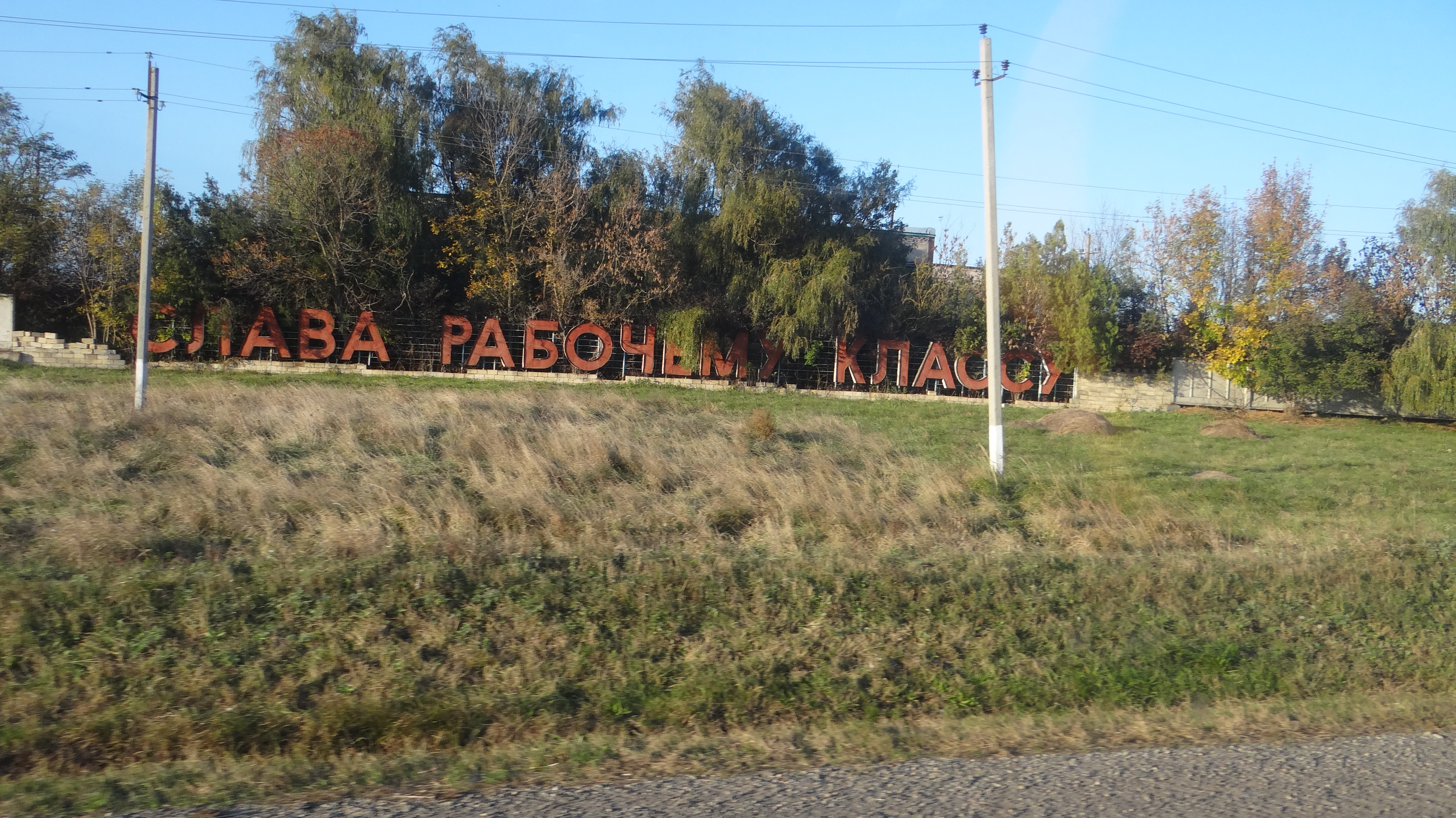 Kavkazskiy, Karachaevo-Cherkesskaya Republits, Russia, 369100